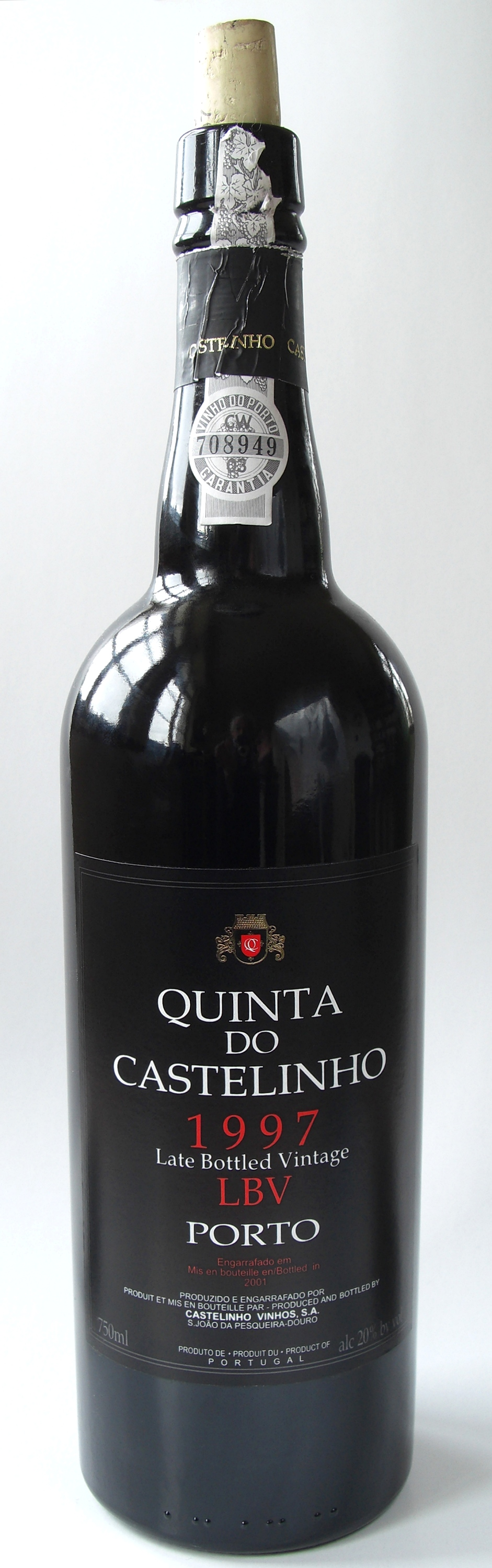 See title